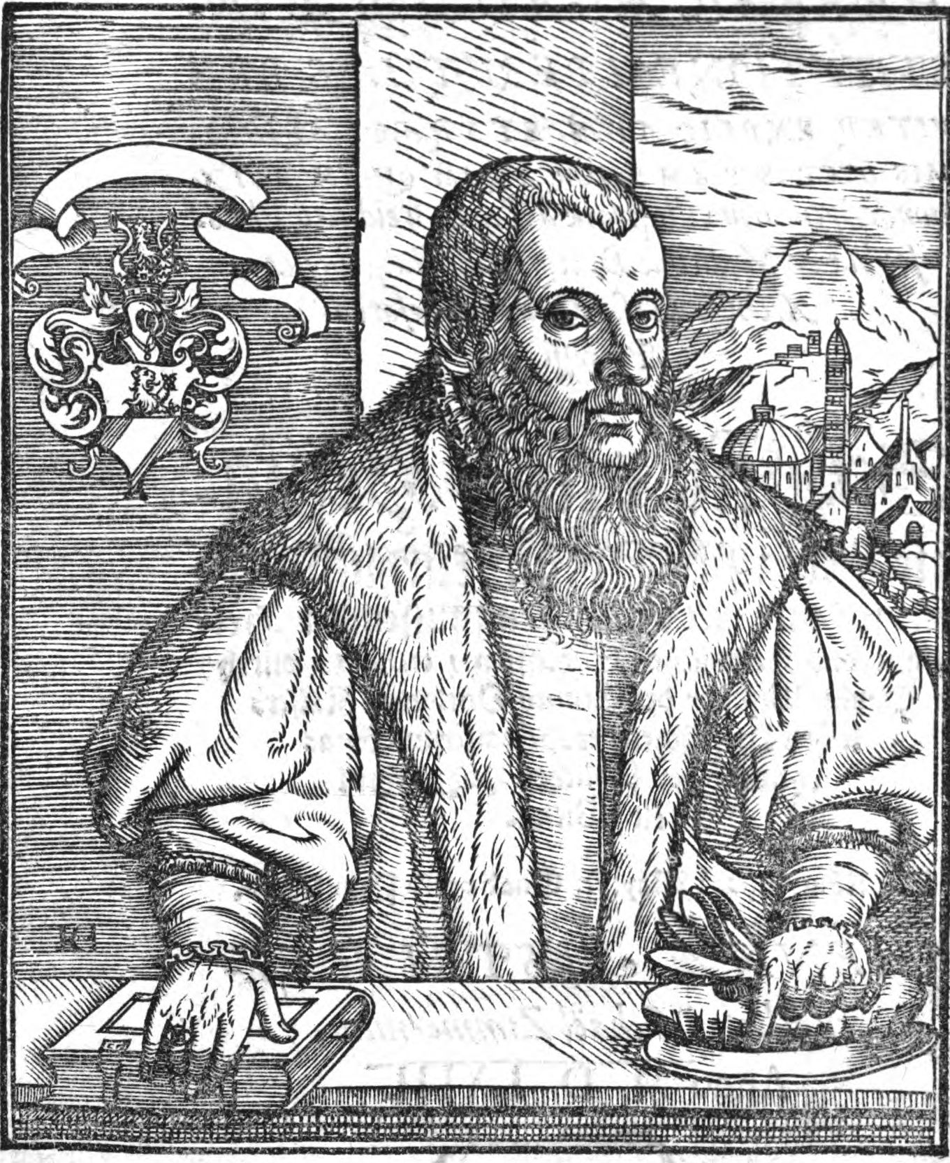 Dr. Paul Weidner im Alter von achtunddreissig Jahren. Titelblatt (Ausschnitt)